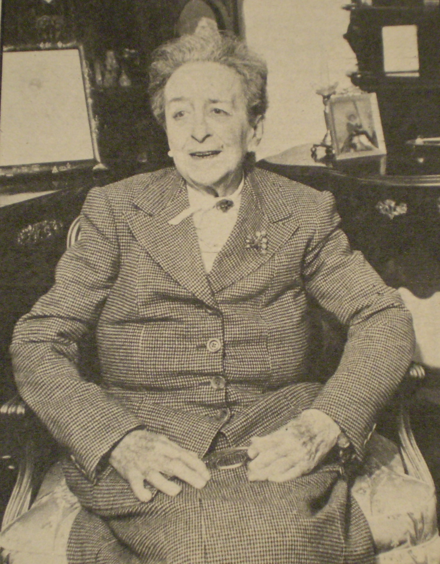 Regina Pacini, esposa de Marcelo T. de Alvear